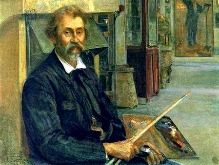 Исаак Бродский. Портрет Ильи Репина 1912 г